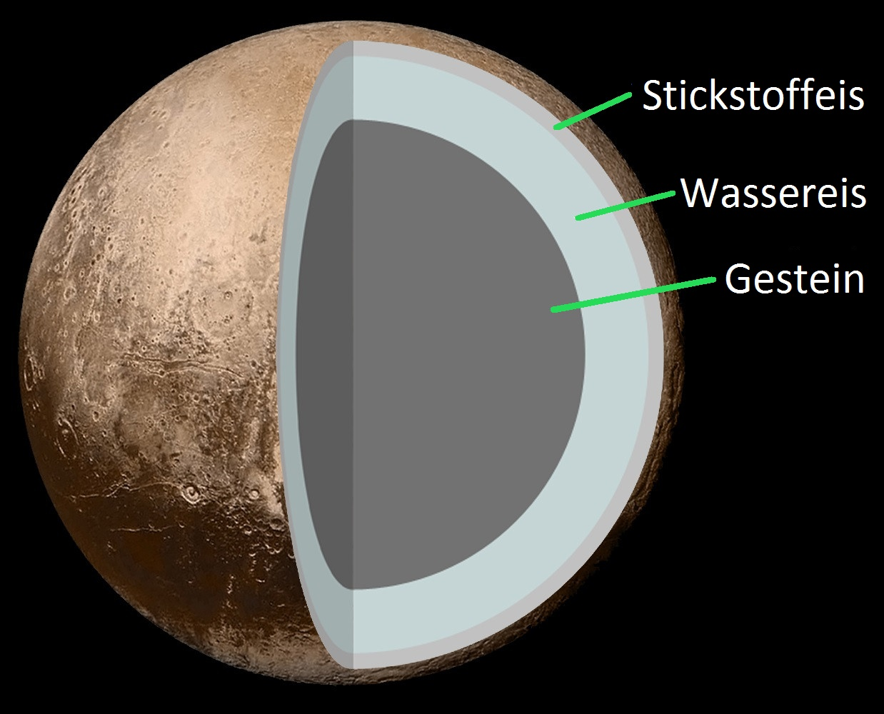 Schema des theoretischen Schalenaufbaus von Pluto